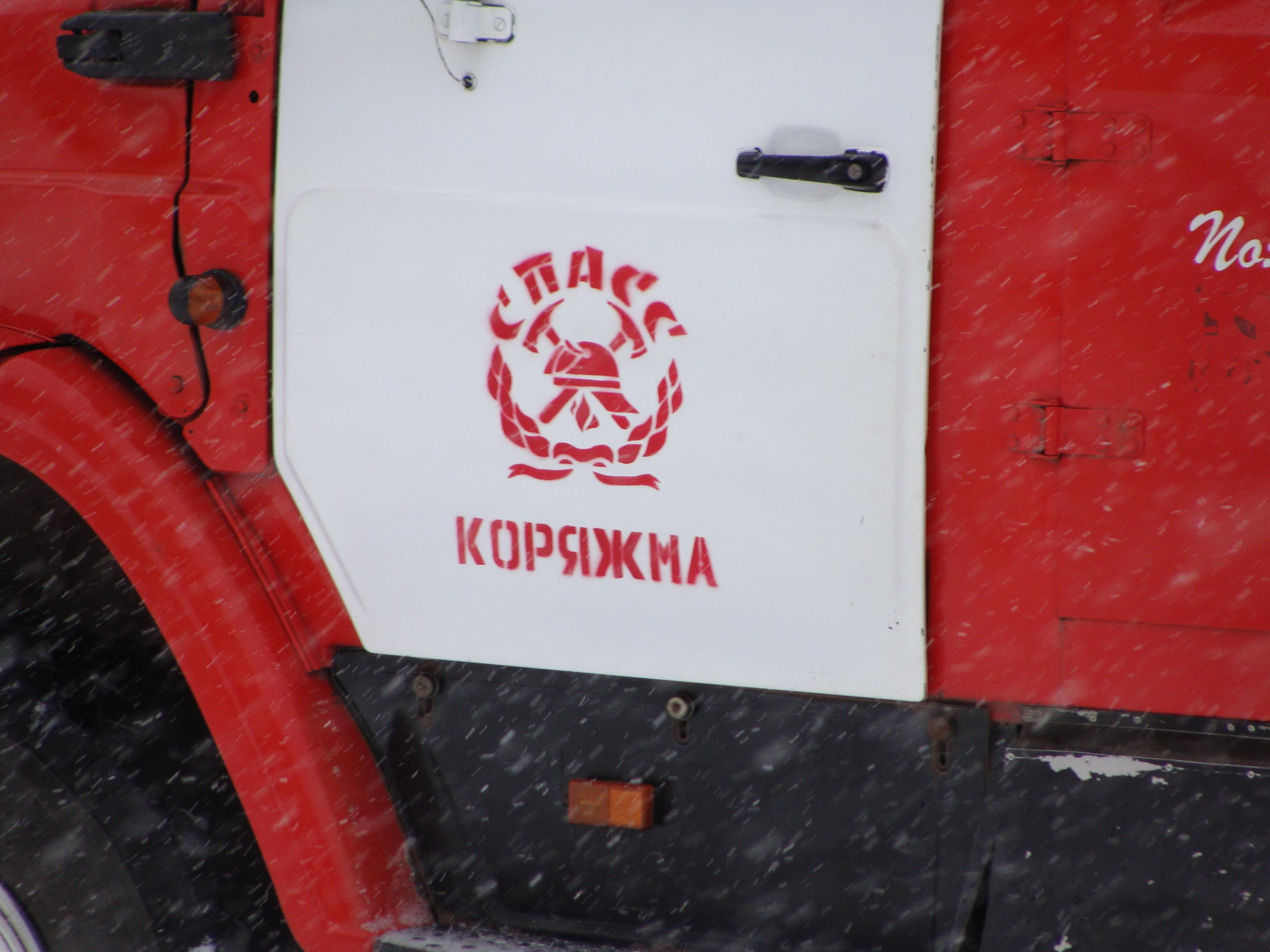 Логотип ООО "СПАСС" на двери автоцистерны